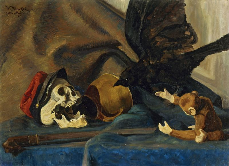 Walter Haeckel: Stilleben 1918